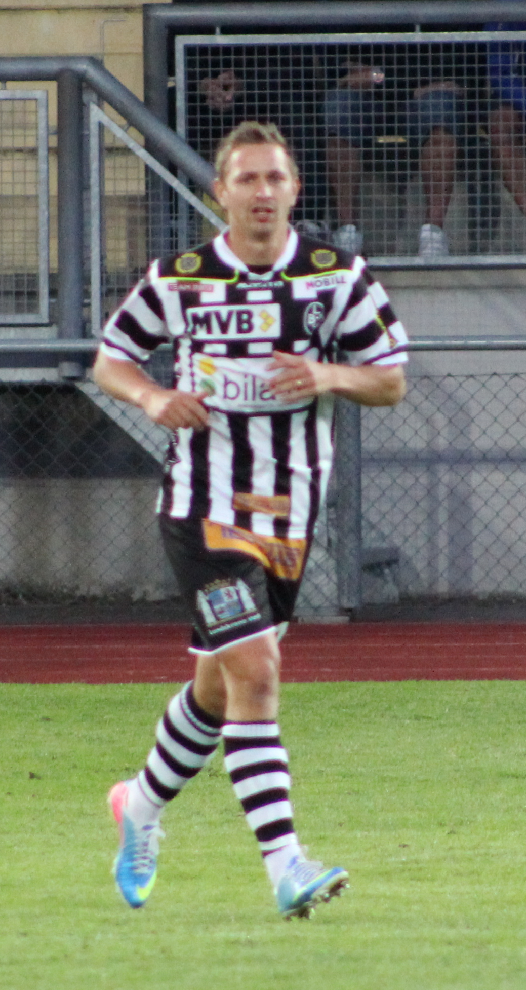 Fredrik Olsson, forward i Landskrona BoIS.